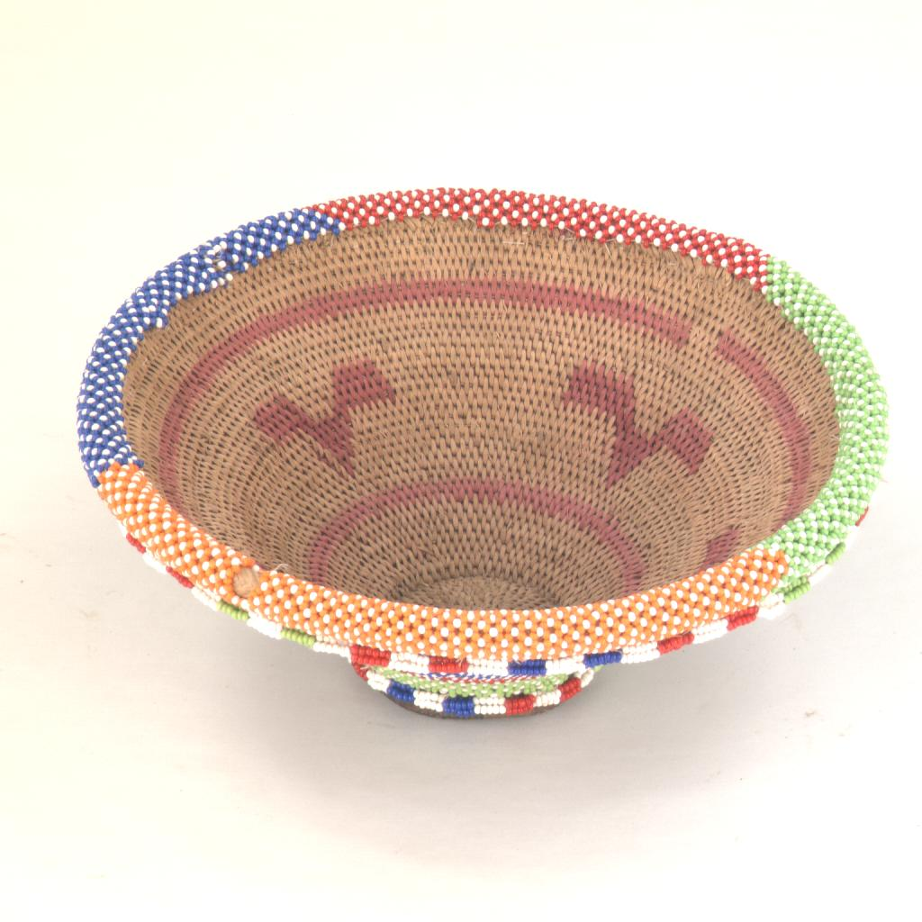 中文（台灣）: 聰加人籠子